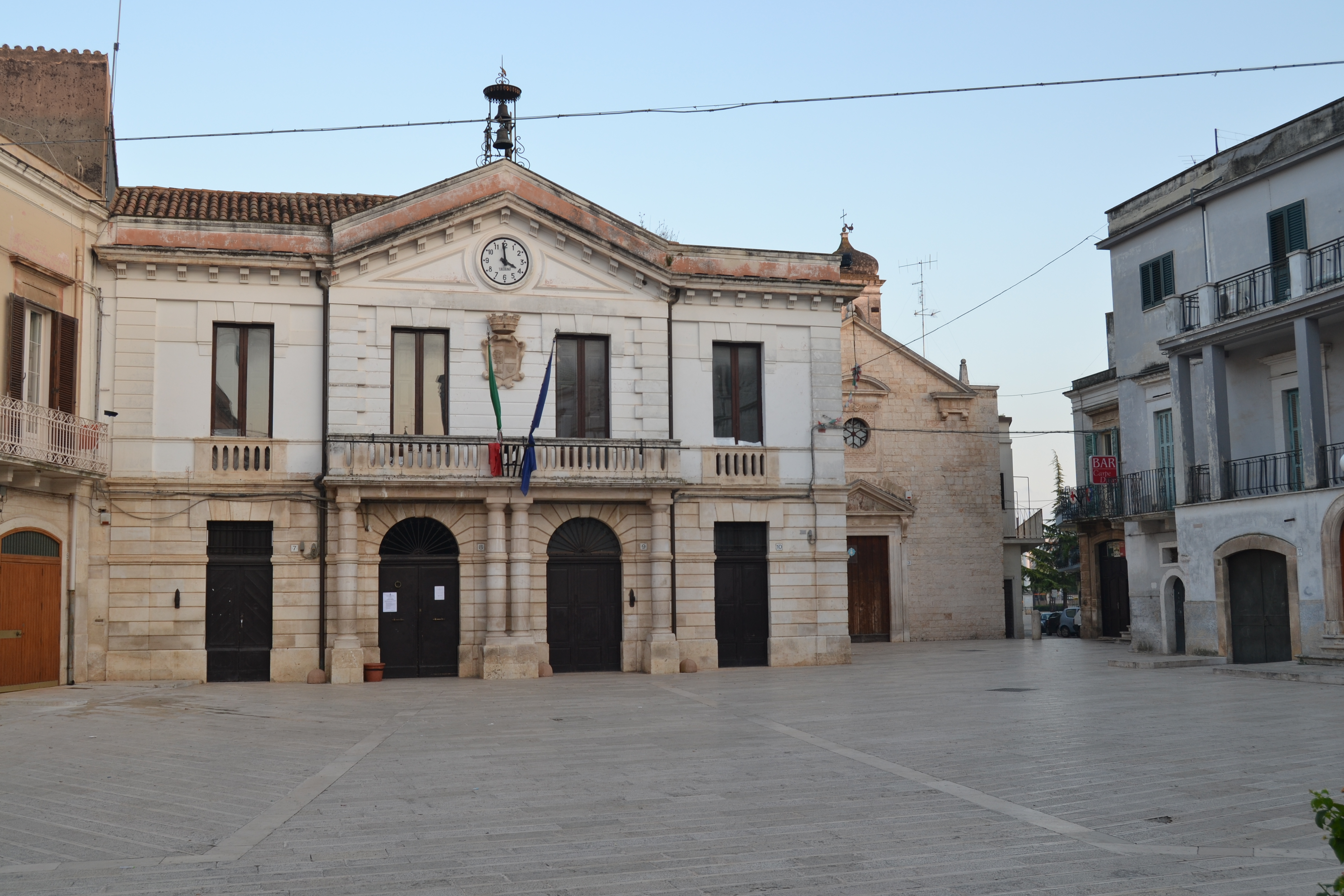 Comune di Grumo Appula